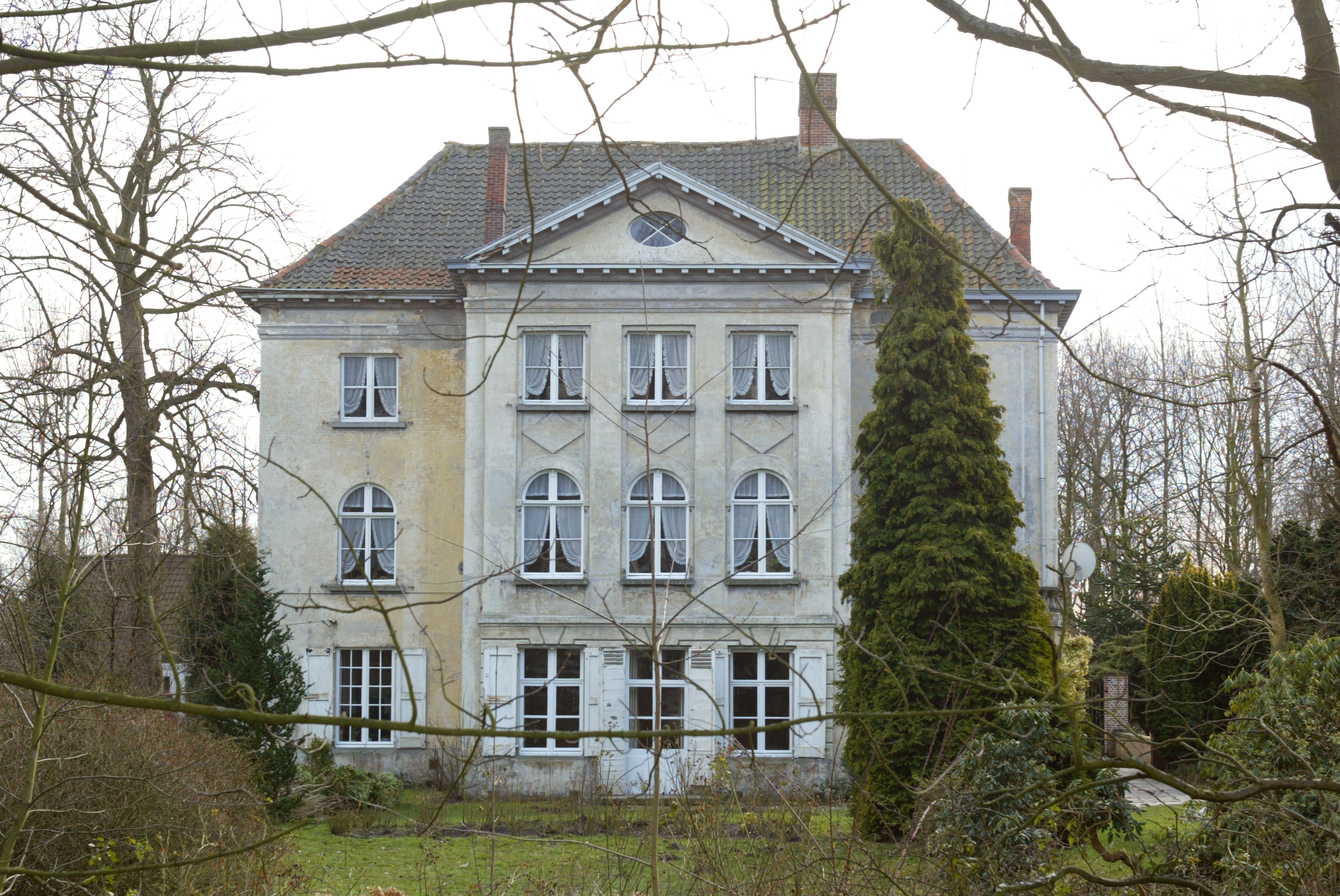 Kasteel Norenburg te St-Andries This is a possible Onroerend Erfgoed: Find the monument in the Monuments database: Waggelwaterstraat 19 in Brugge All Onroerend Erfgoed in Brugge Is this Onroerend Erfgoed? Yes No More images to work at in Category:Possible onroerend erfgoed.